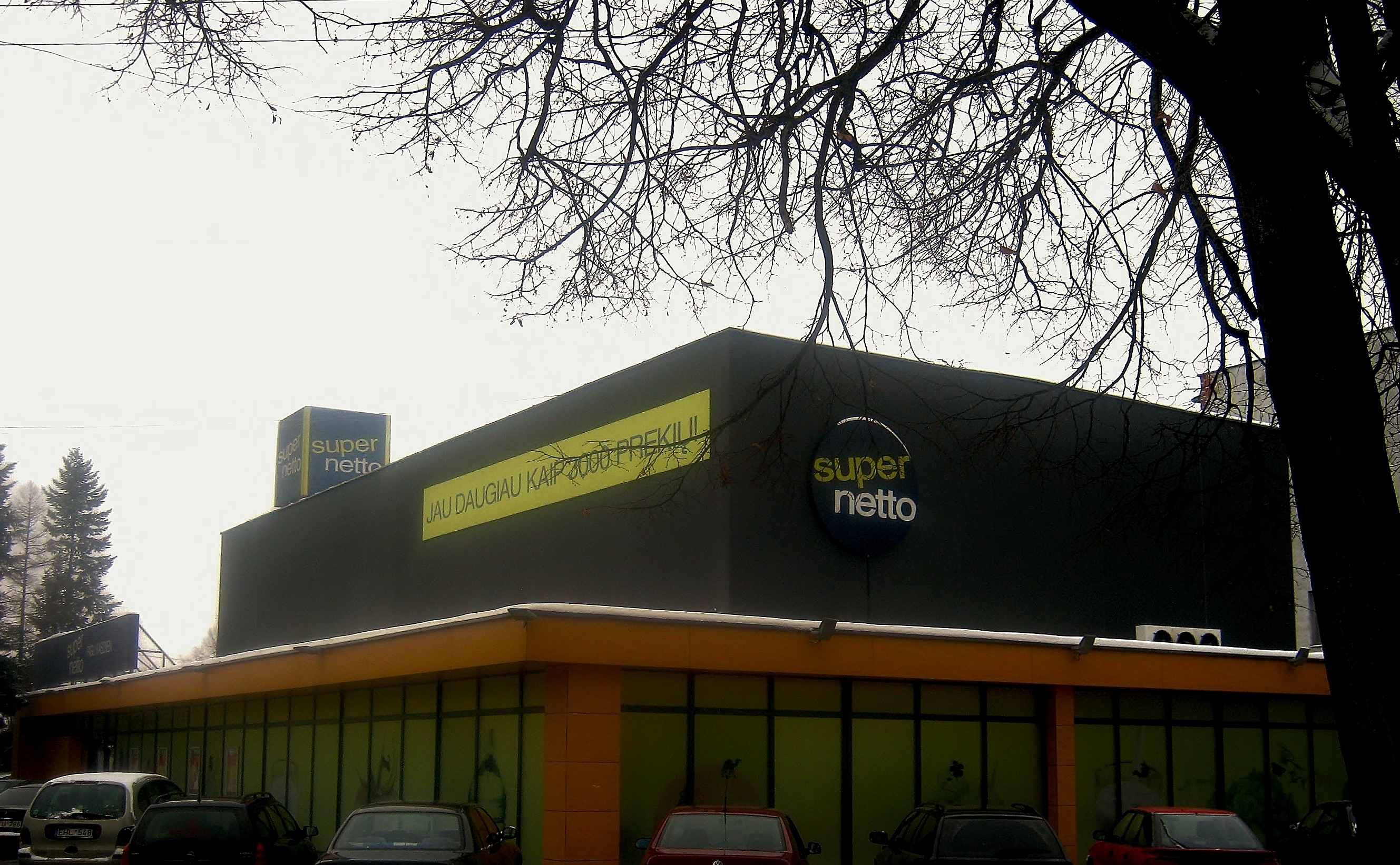 Super Netto